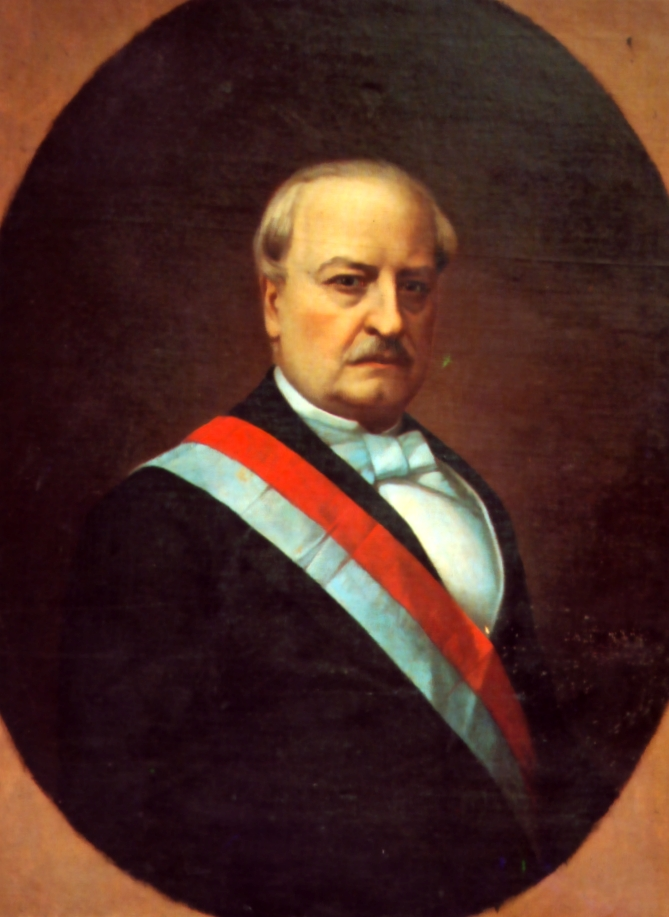 Luis La Puerta de Mendoza (1811 - 1896). Militar y político peruano, Presidente provisorio en 1868 y en 1879.